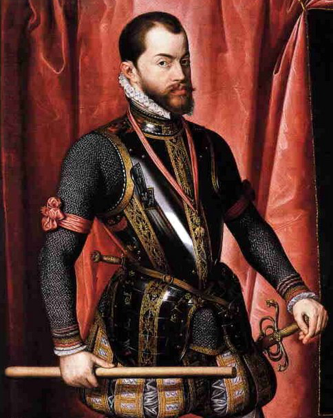 Pantoja de la Cruz Copia de Antonio Moro. Felipe II 1606-8.